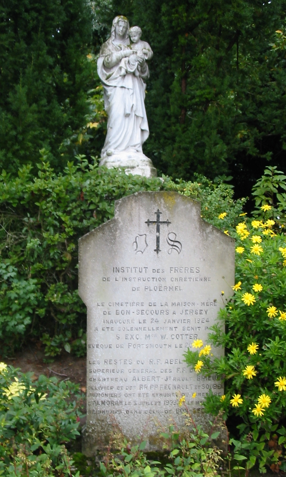 Nrf: Dêpartément pouor l'Êducâtion, l'Sport et la Tchultuthe, Jèrri